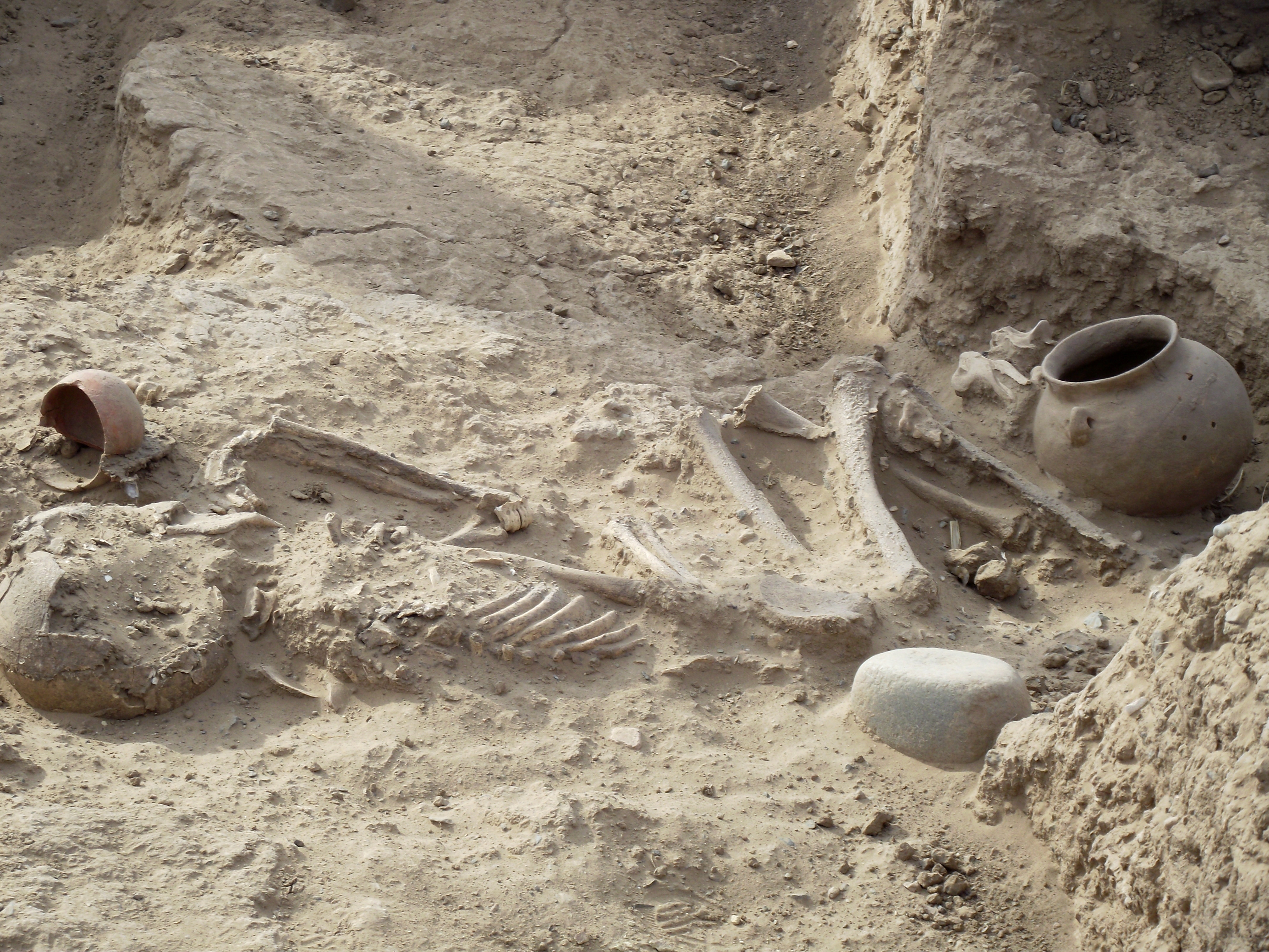 تپه دامغانی